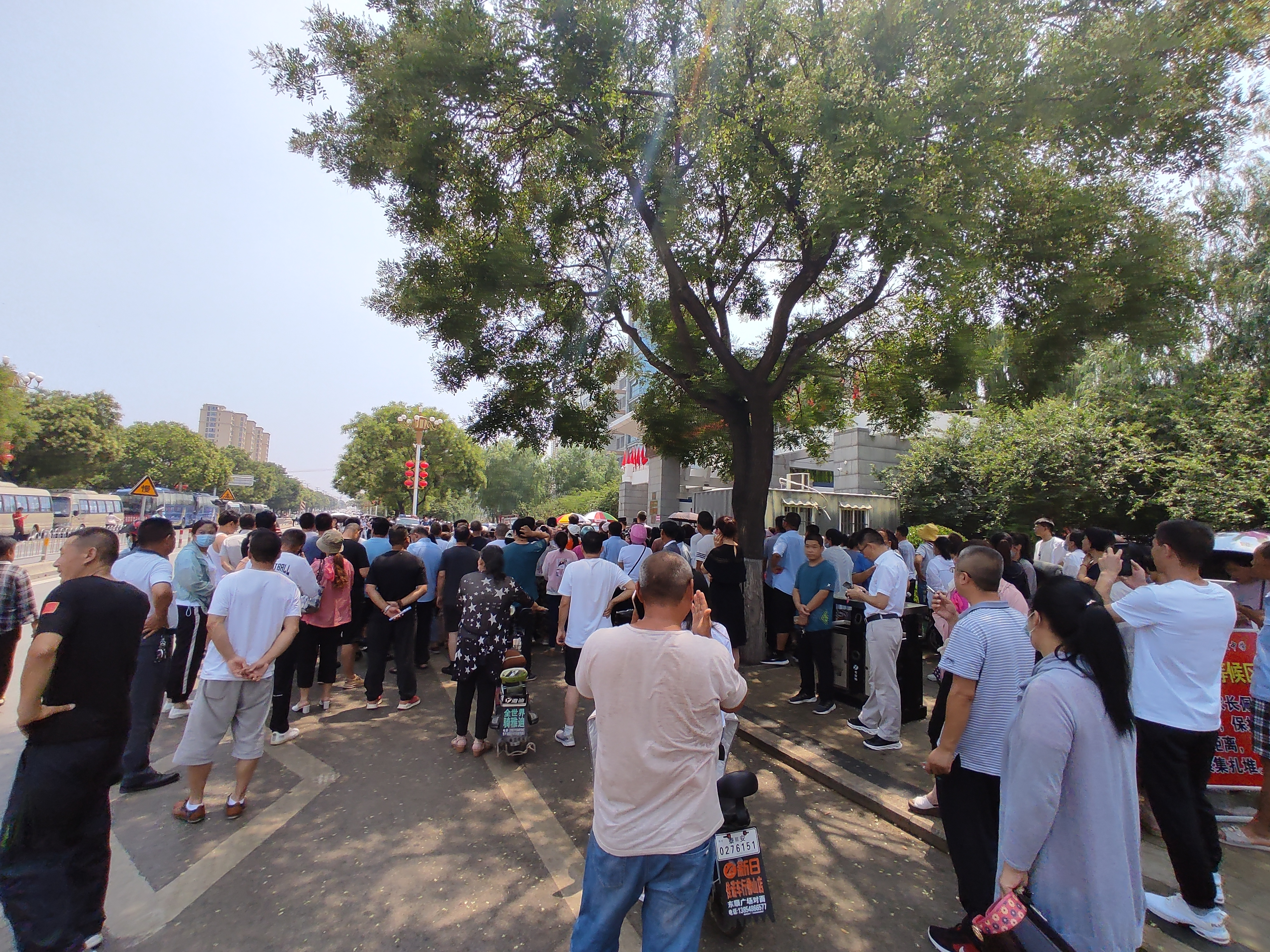 2020年中国普通高等学校招生全国统一考试，图为7月7日上午11点33分，语文科目结束后等候在考点山东省东平县高级中学外的家长。